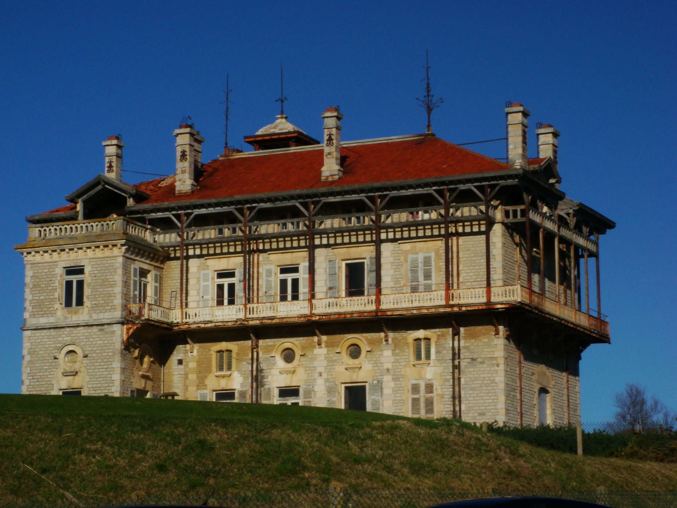 Le château d'Ilbarritz est situé à Bidart (Pyrénées-Atlantiques) où il domine l'océan. Cette "folie" du Baron Albert de l'Espée fut construite entre 1894 et 1907 (ne se visite pas).